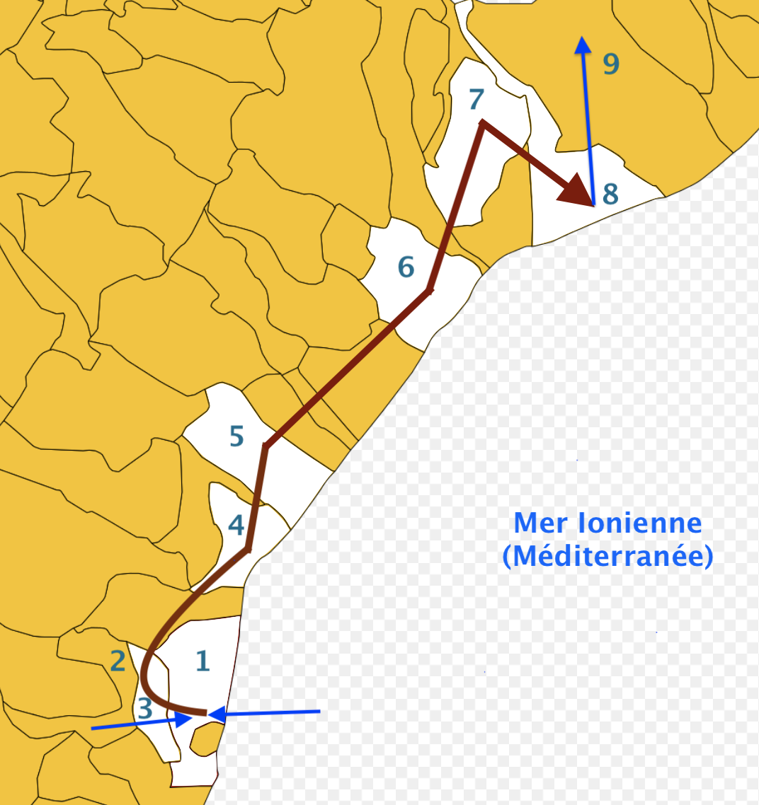 Parcours des insurgés lors de la Révolte de Gerace de 1847.